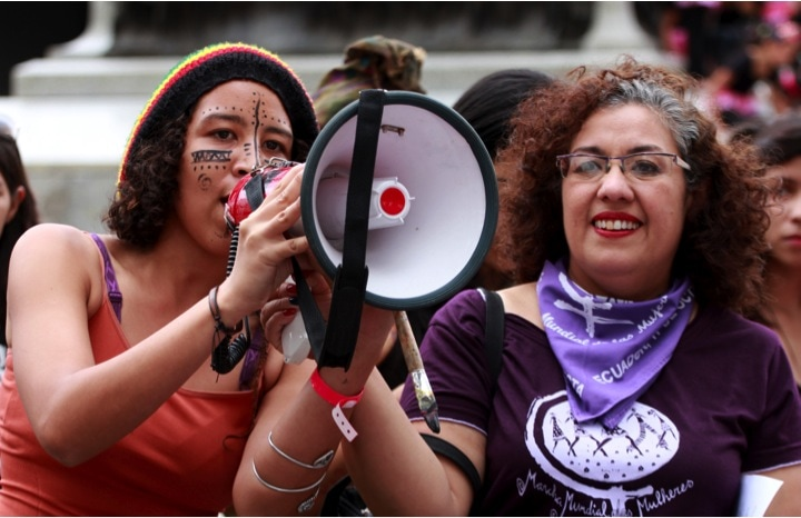 Manifestando